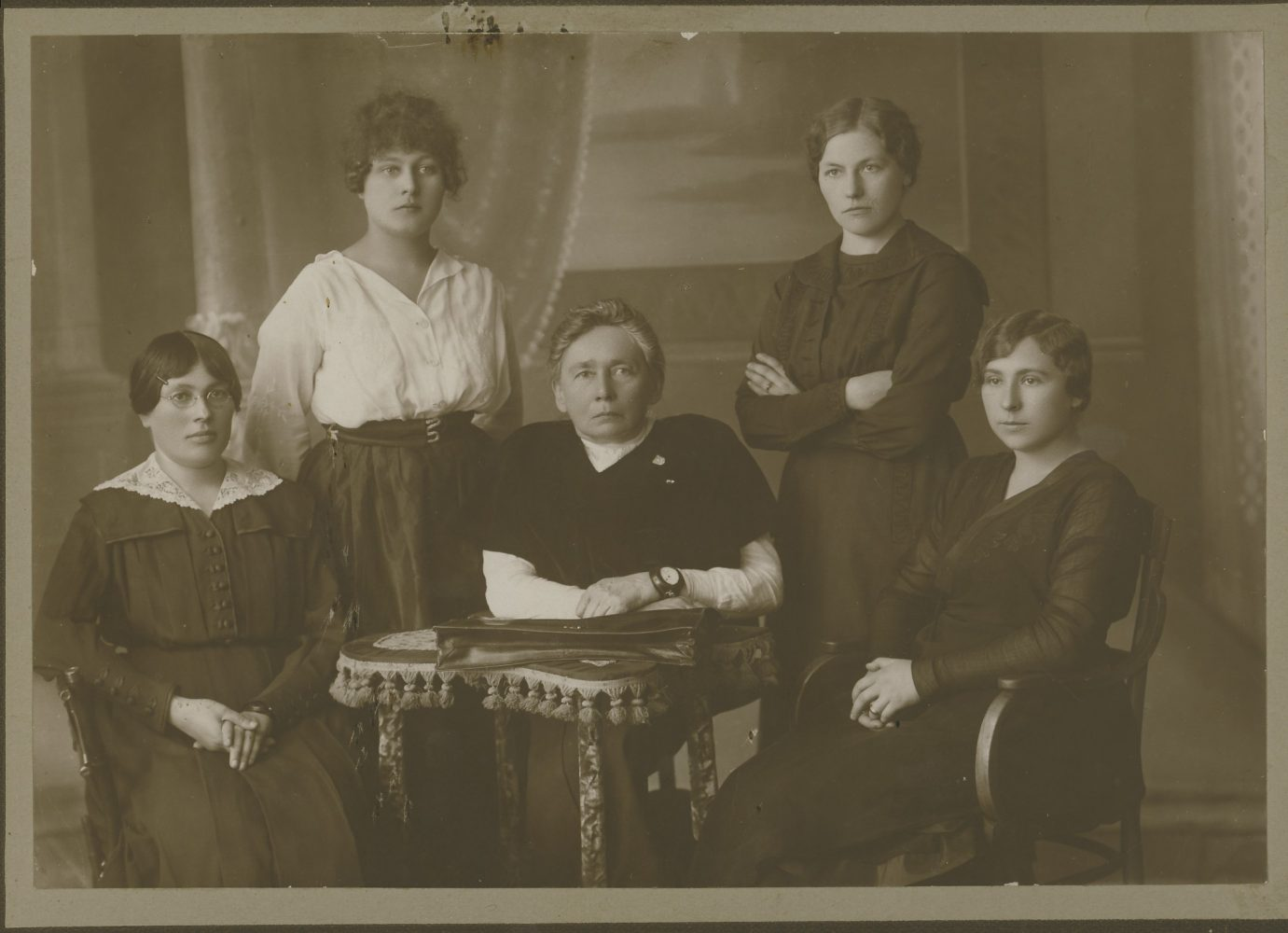 Women members of the Constituent Assembly of Lithuania (from left): Emilija Spudaitė-Gvildienė, Ona Muraškaitė-Račiukaitienė, writer Gabrielė Petkevičaitė-Bitė (sits in the center), Salomėja Stakauskaitė, Magdalena Draugelytė-Galdikienė